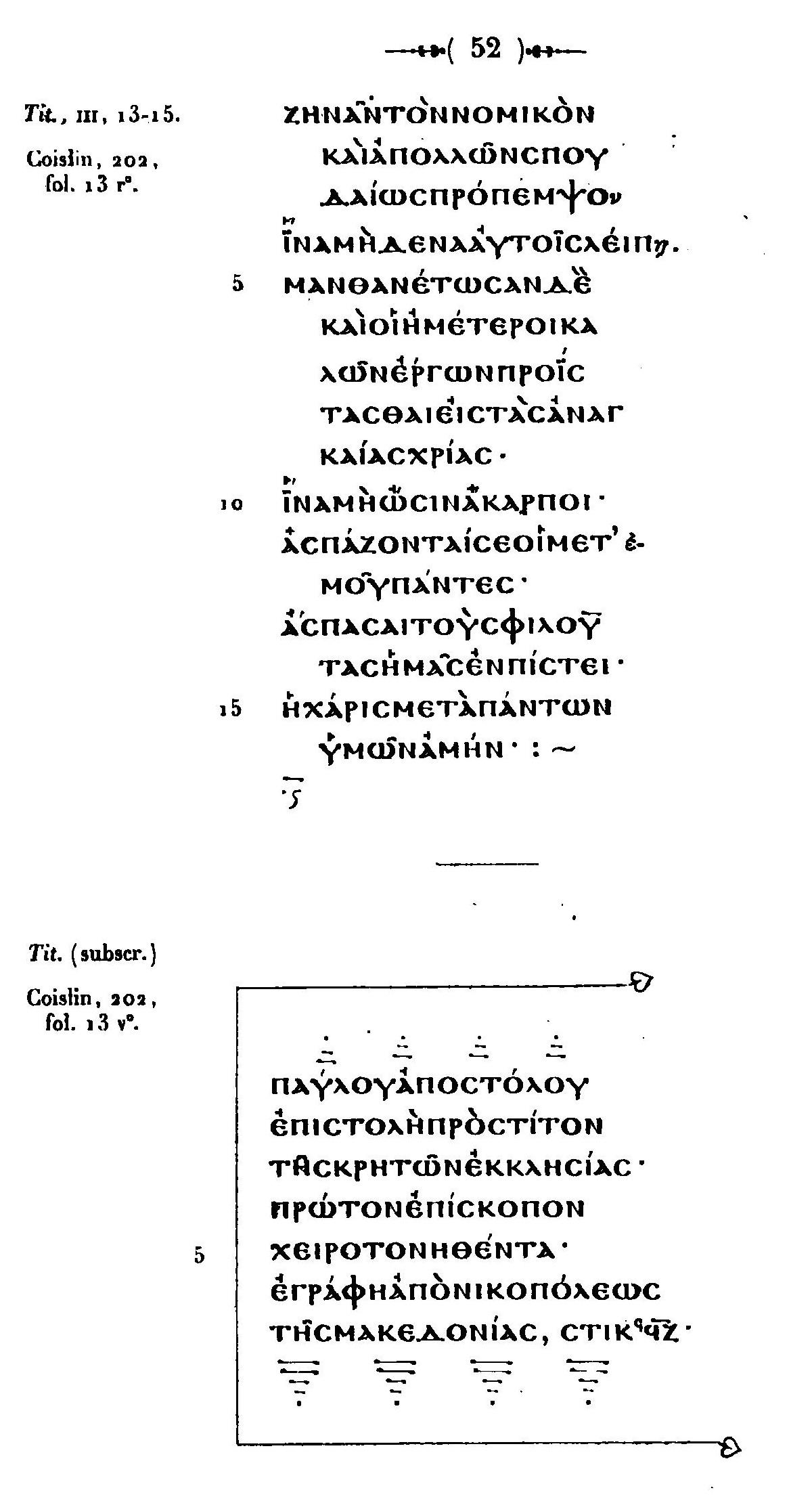 fac-similé de Henri Omont (1889)